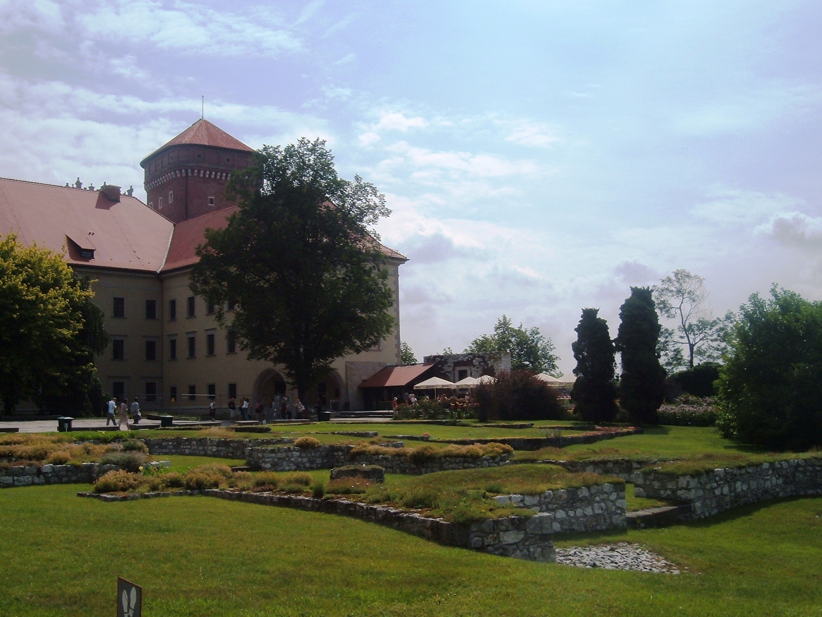 Kraków, Poland